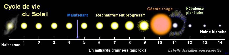 Représentation schématique des étapes de la vie du Soleil.